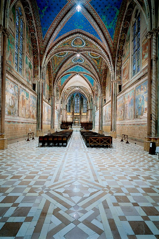 Assisi, la Basilica superiore di San Francesco